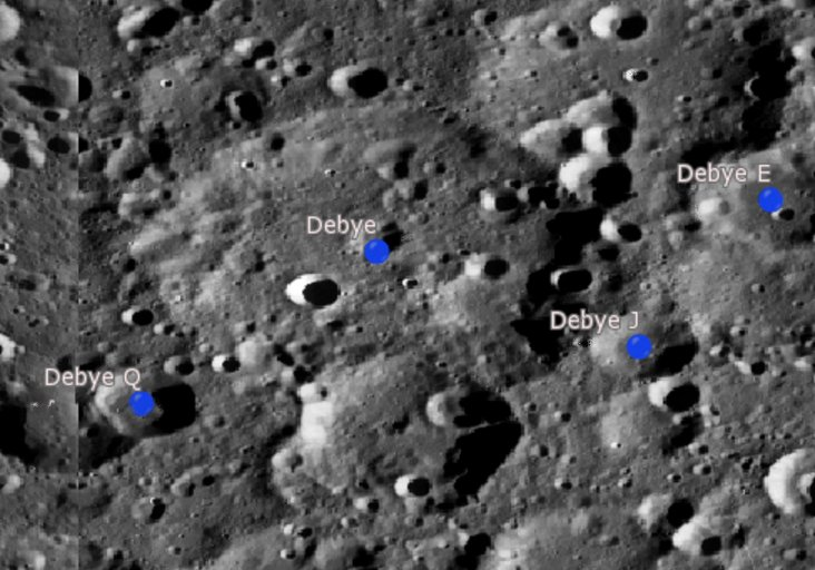 Cráter lunar Debye. Cráteres satélite (LRO)